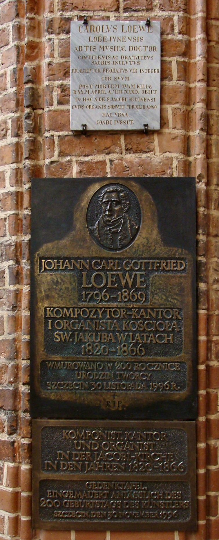 Szczecin Katedra św. Jakuba